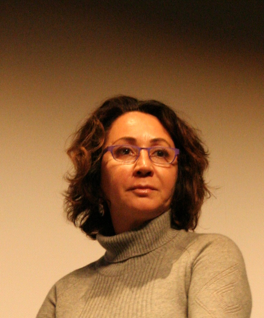 Selma Gürbüz au festival international des cinémas d'Asie de Vesoul